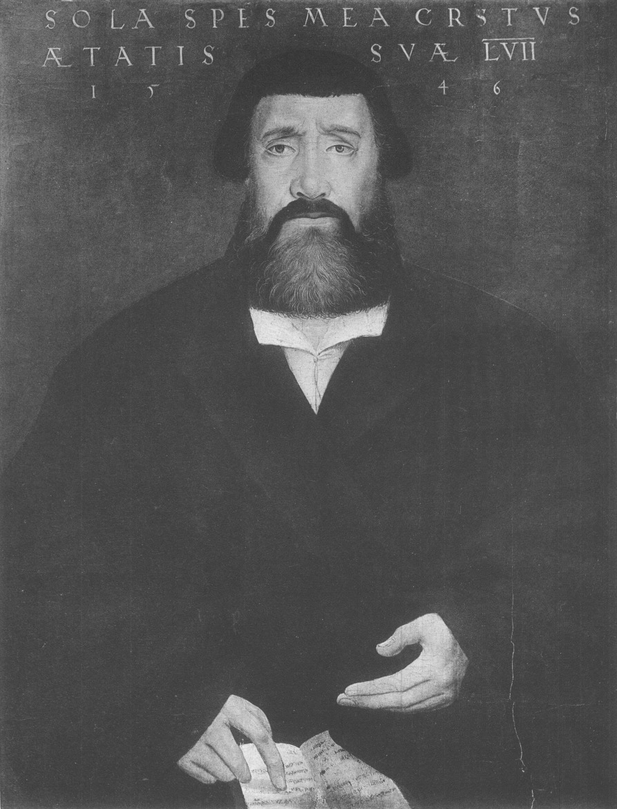 Johann Heß (1490–1547), Gemälde auf Holz, 57 × 74 cm, Inschrift: Sola Spes Mea Crstus Ætatis Suæ LVII 15 46